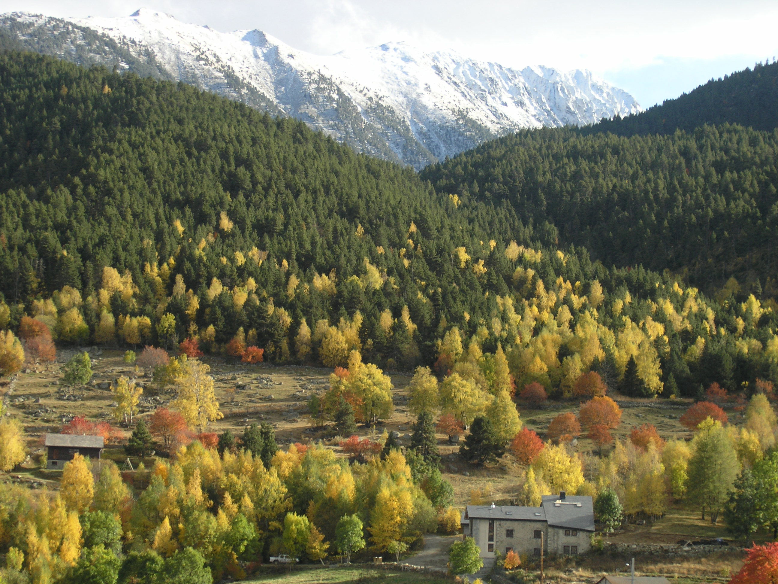 L'Orri de Planes, Planès, Pyrénées-Orientales, Languedoc-Roussillon (France)